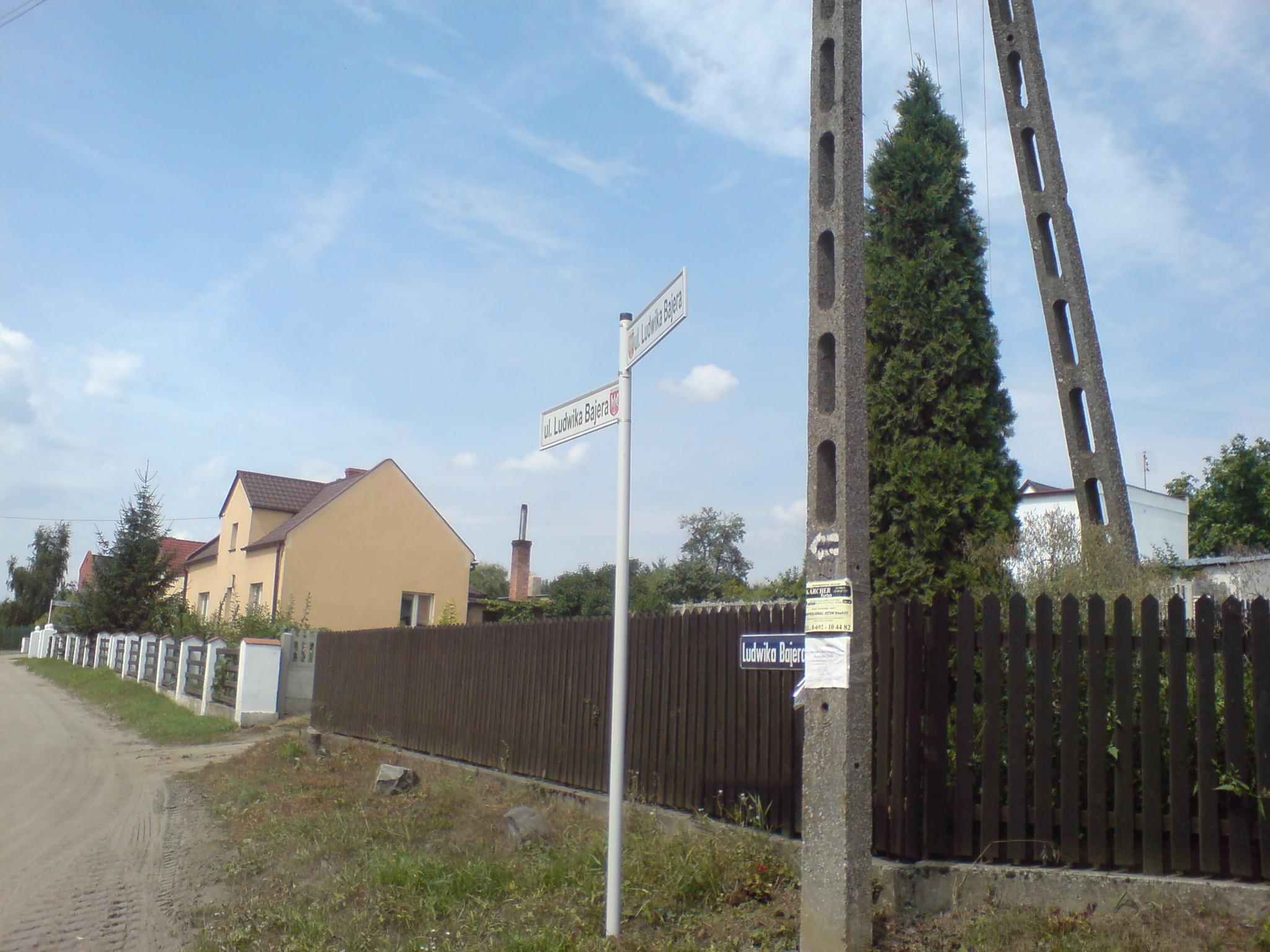 Dymaczewo Stare czarny szlak